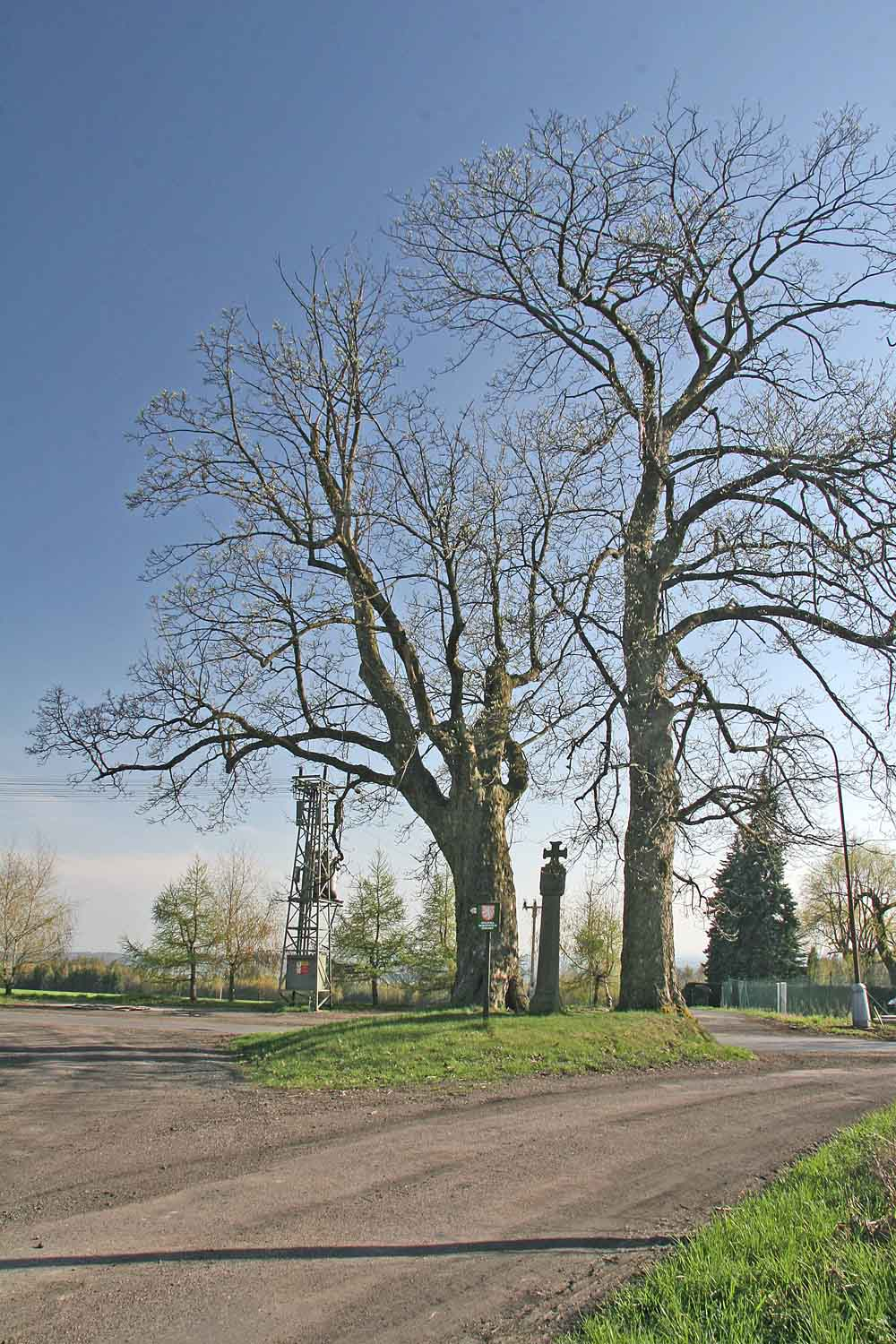 Památné javory kleny v obci Boháňka